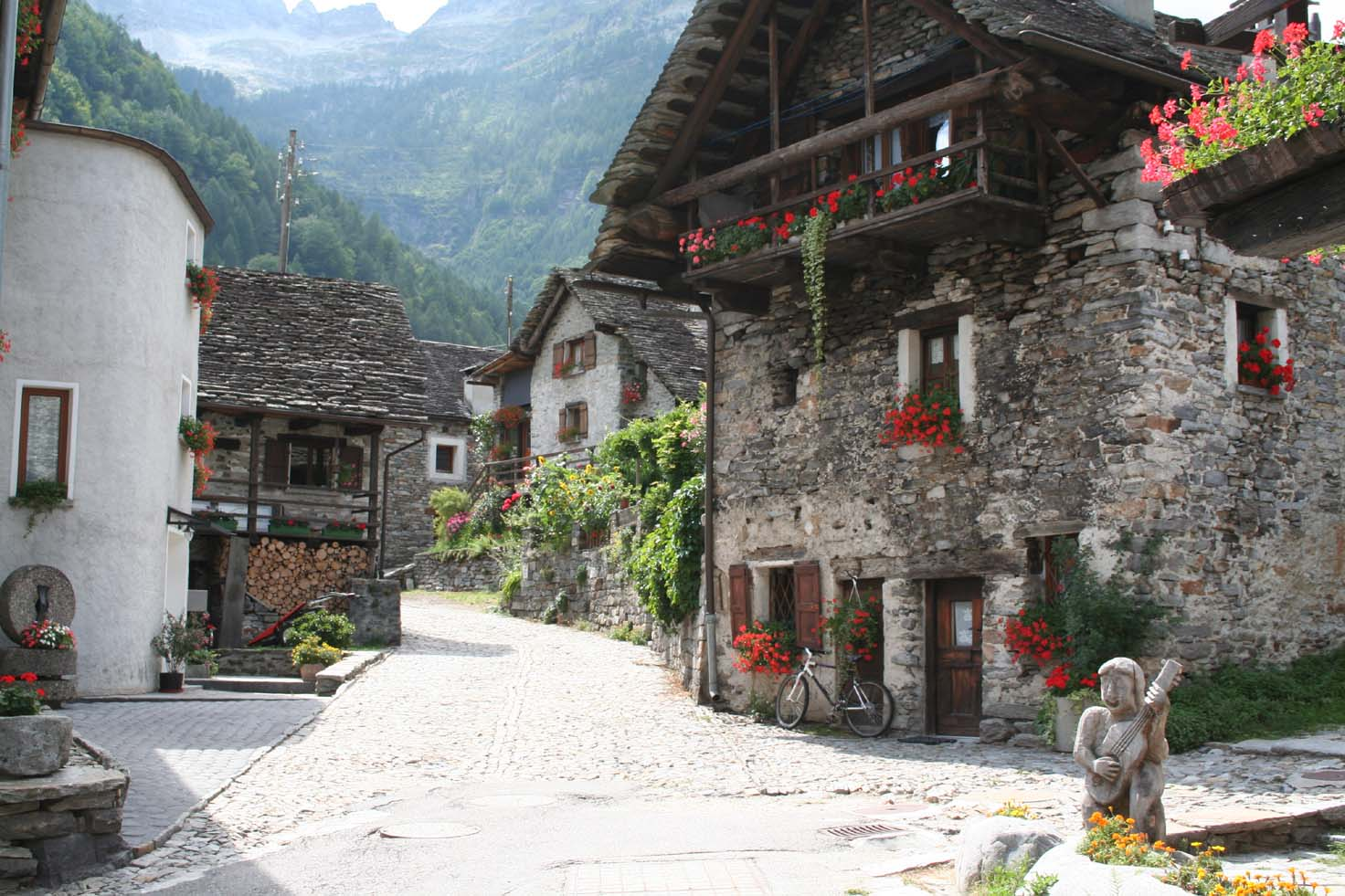 In Sonogno TI